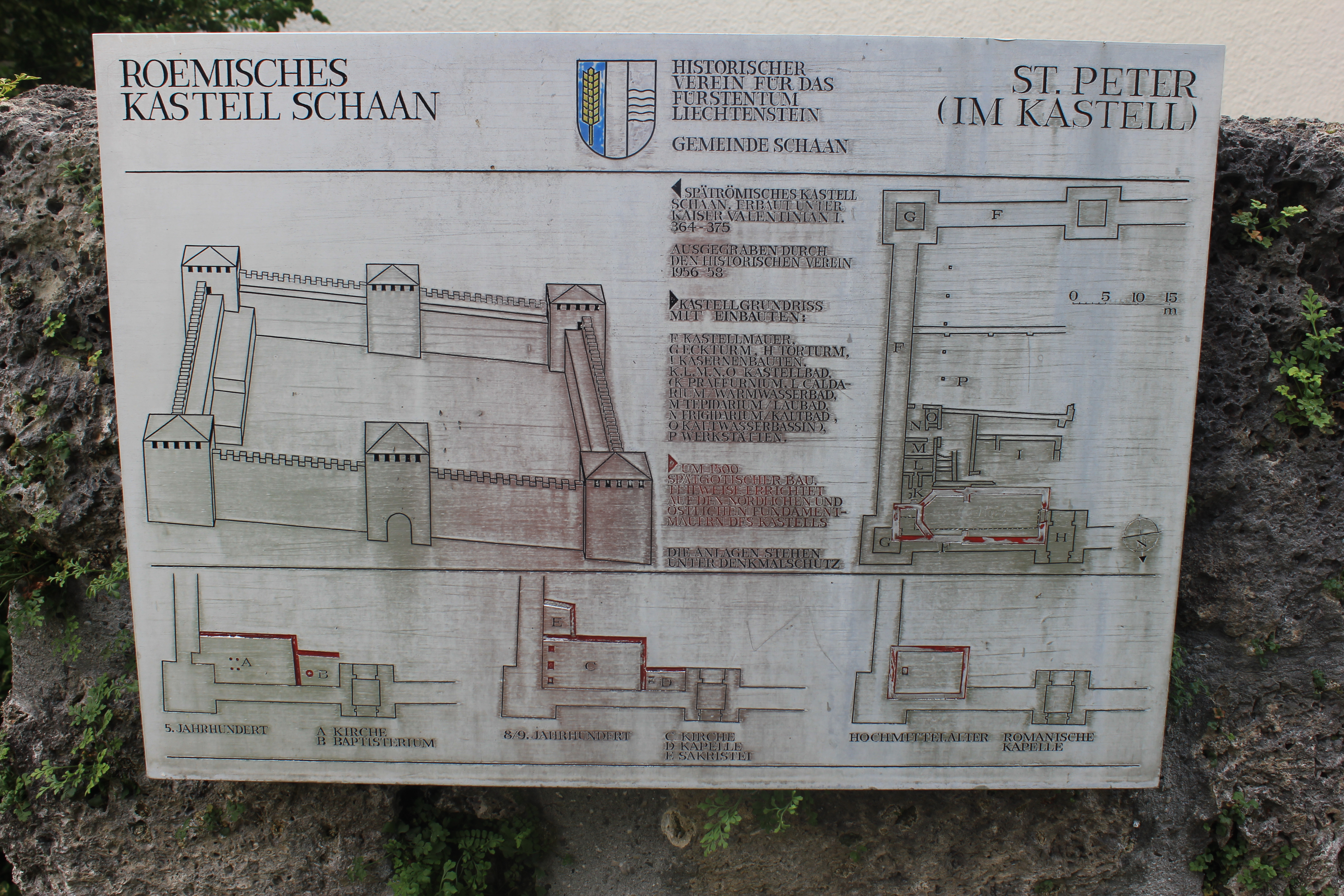 Lageplan des römischen Kastells Schaan.